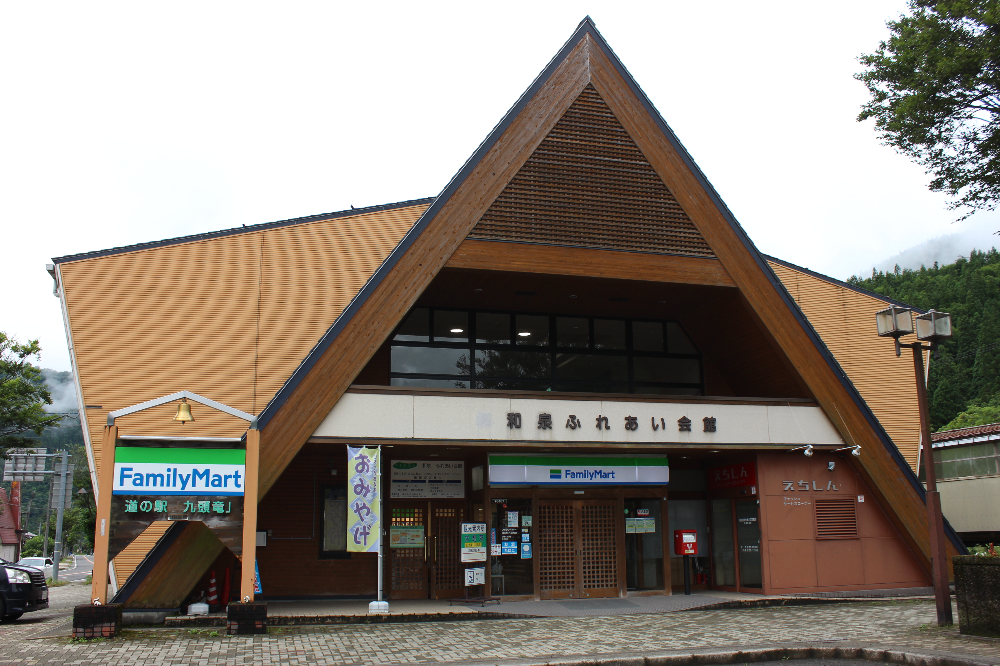 道の駅九頭竜に併設されているファミリーマート Canon EOS Kiss X5